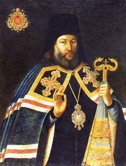 Феодосий (Янковский, Иоанковский, Янкевич) Государственный Русский музей. Живопись. XVIII век. Каталог. Т. 1. СПб: Palace Edition, 1998.